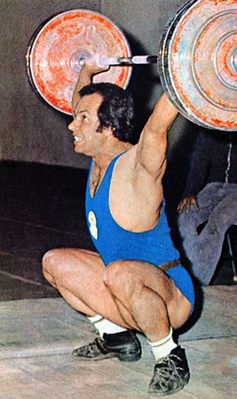 Parviz Jalayer